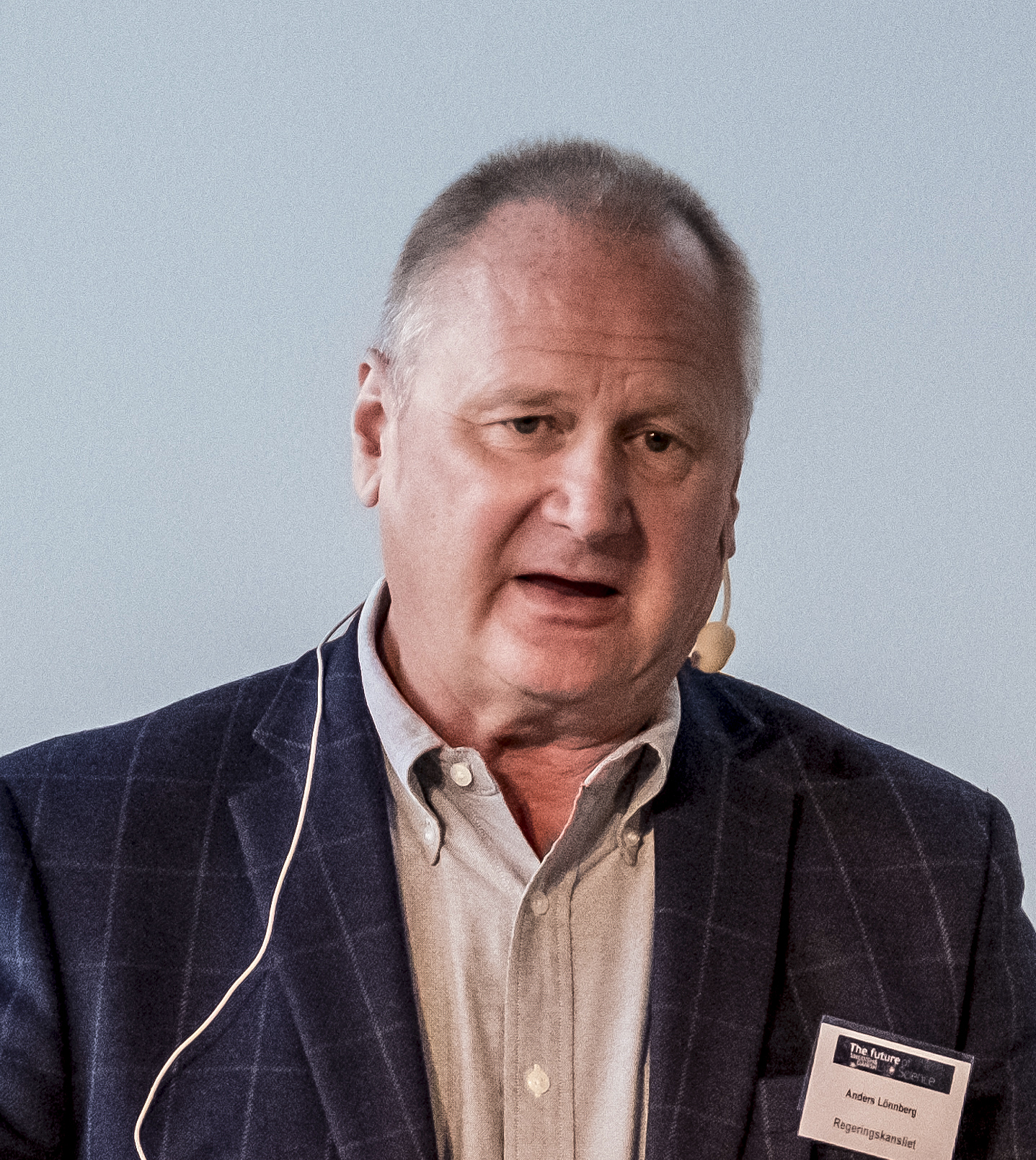 Anders Lönnberg, den svenska regeringens samordnare för life science sedan våren 2015 och som fått sitt förordnande förlängt flera gånger och nu in i 2017. I hans expertgruipp ingår även danska läkemedelsjätten Novo Nordisk svenska styrelseordförande Göran Ando. Han driver även Sveriges kandidatur att få överta den europeiska läkemedelsmyndigheten EMA som måste lämna London i samband med Brexit. Bilden tagen i samband med att han talade vid konferensen The future of swedish & danish life science vid Medicon Village i Lund där han på en fråga från publiken tydligt klargjorde att han på regeringens uppdrag arbetar för att EMA hamnar i Stockholm och att han anser Stockholm överlägset Köpenhamn som hemvist för EMA.. Photo: News Øresund - Johan Wessman. © News Øresund - Johan Wessman (CC BY 3.0). Detta verk av News Øresund är licensierat under en Creative Commons Erkännande 3.0 Unported-licens (CC BY 3.0). Bilden får fritt publiceras under förutsättning att källa anges. .The picture can be used freely under the prerequisite that the source is given. News Øresund, Malmö, Sweden.News Øresund är en oberoende regional nyhetsbyrå som är en del av det oberoende dansk-svenska kunskapscentrat Øresundsinstituttet...